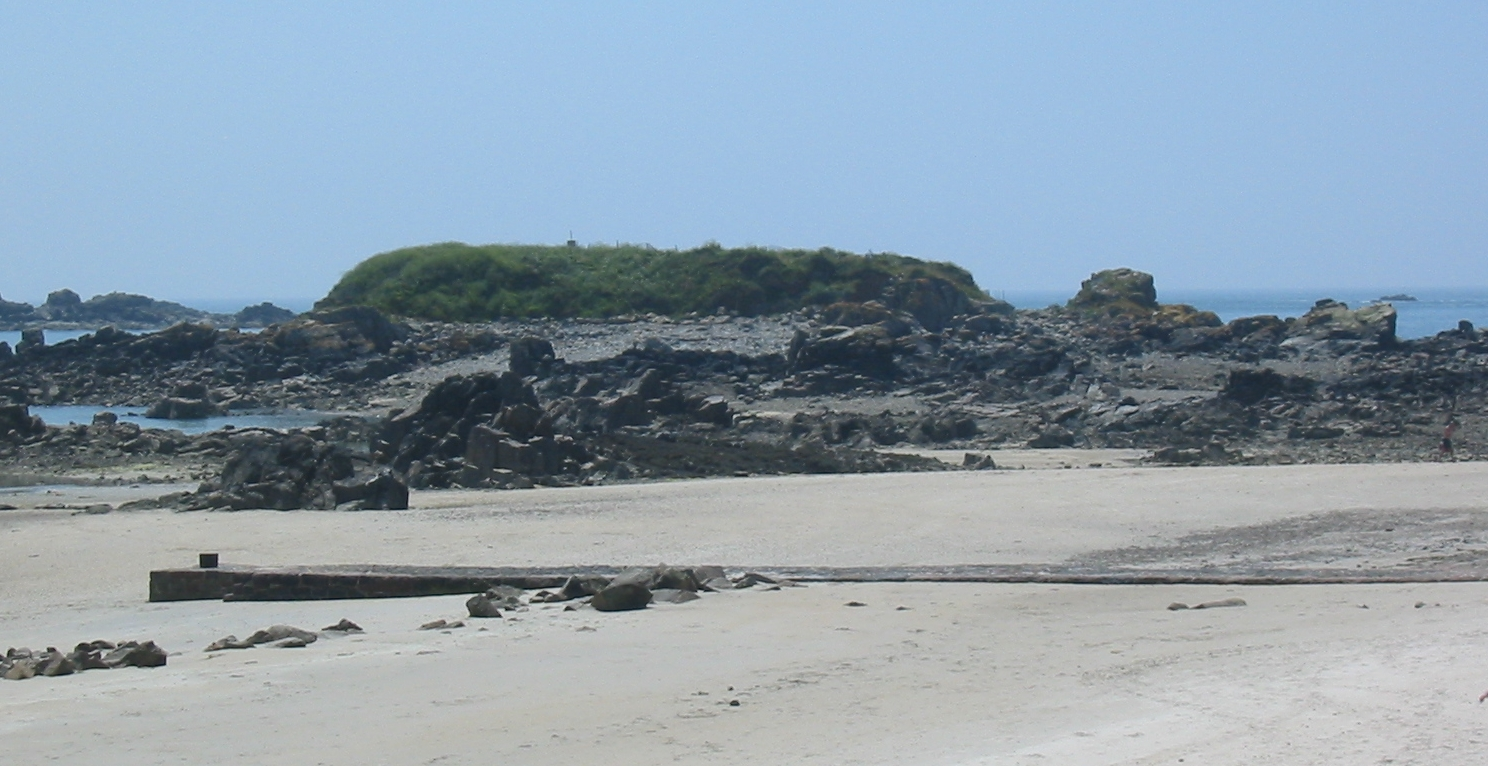 Nrf: La Motte, Jèrri